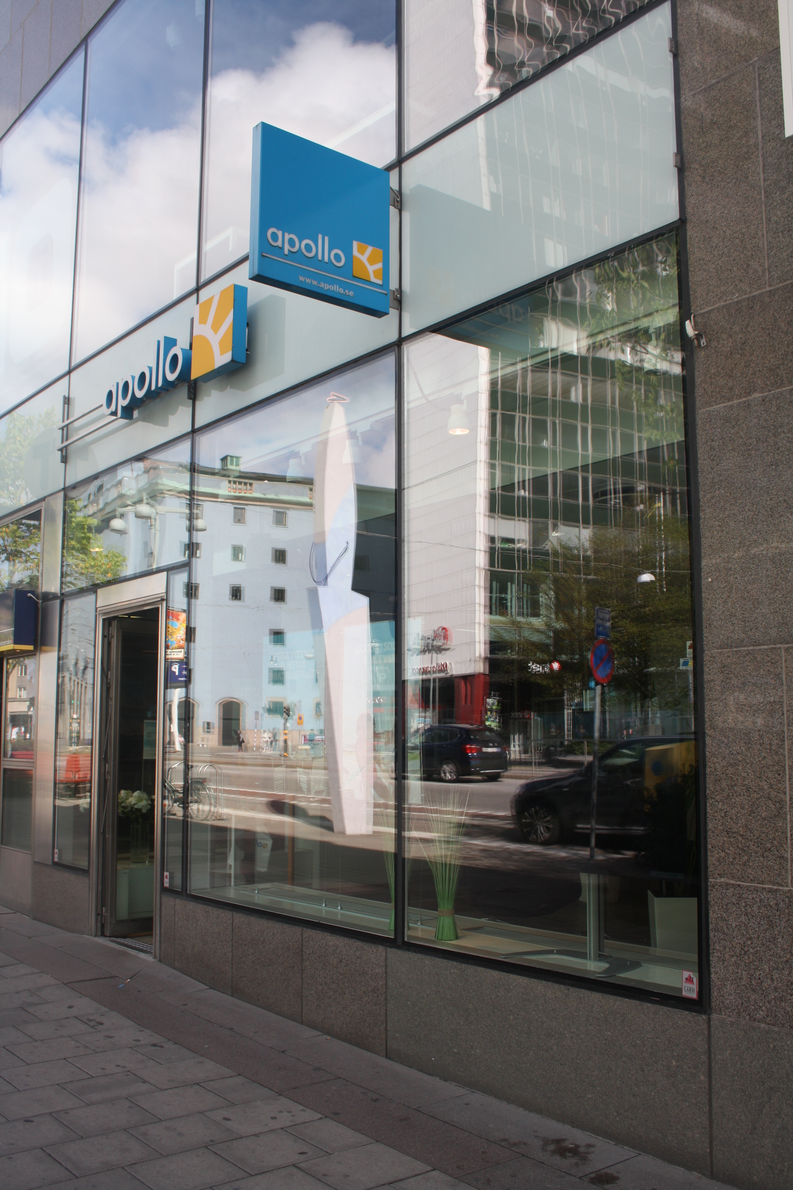 Apollo på Sveavägen